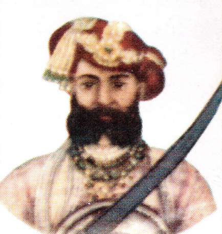 Malhar Rao Holkar II, Maharaja of Indore